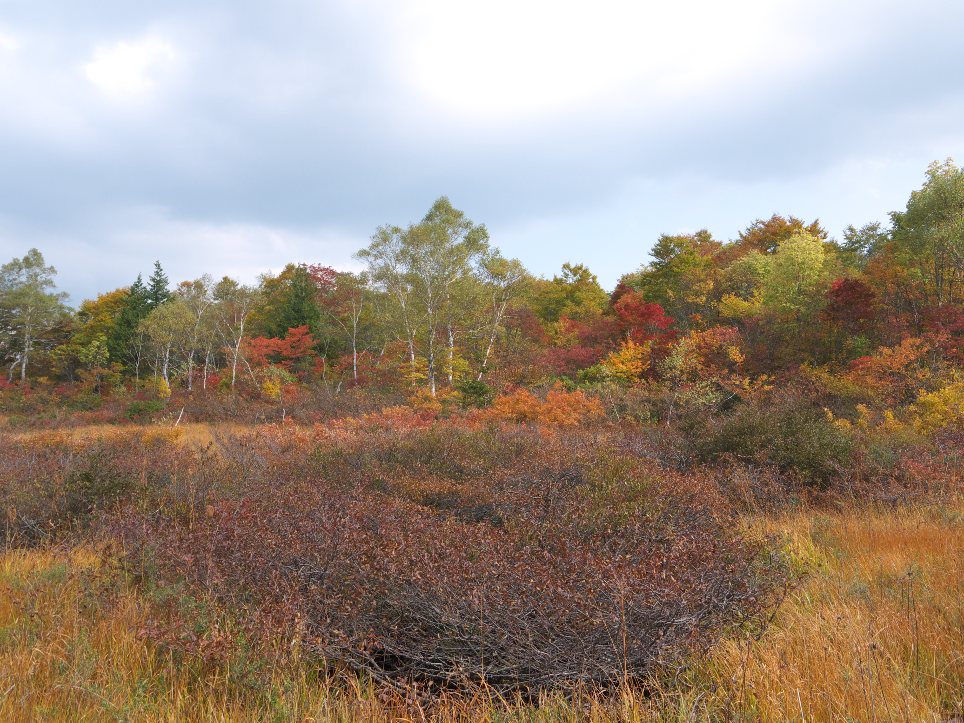 駒止湿原、大沼